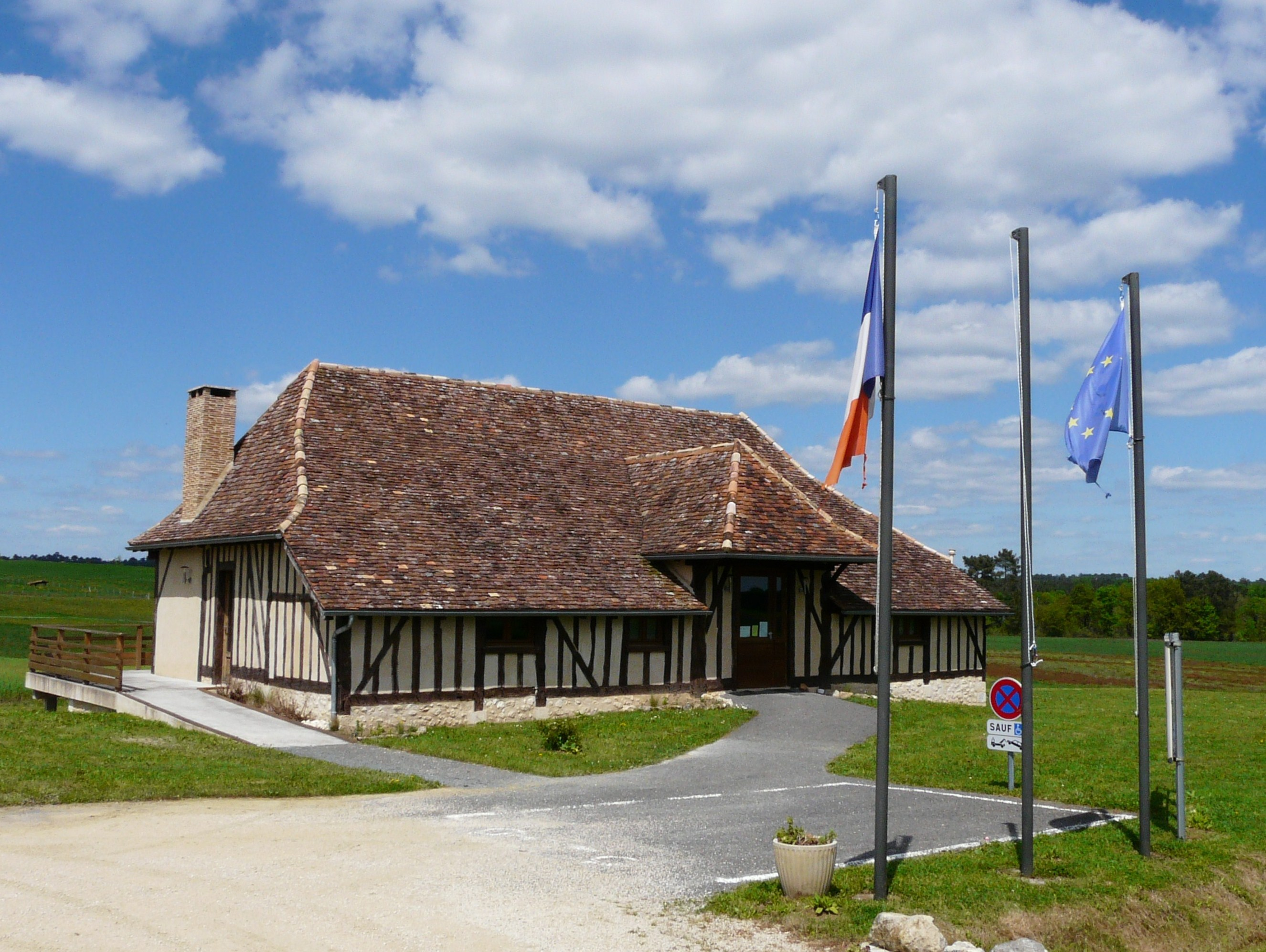 La mairie de Saint-Georges-Blancaneix, Dordogne, France.